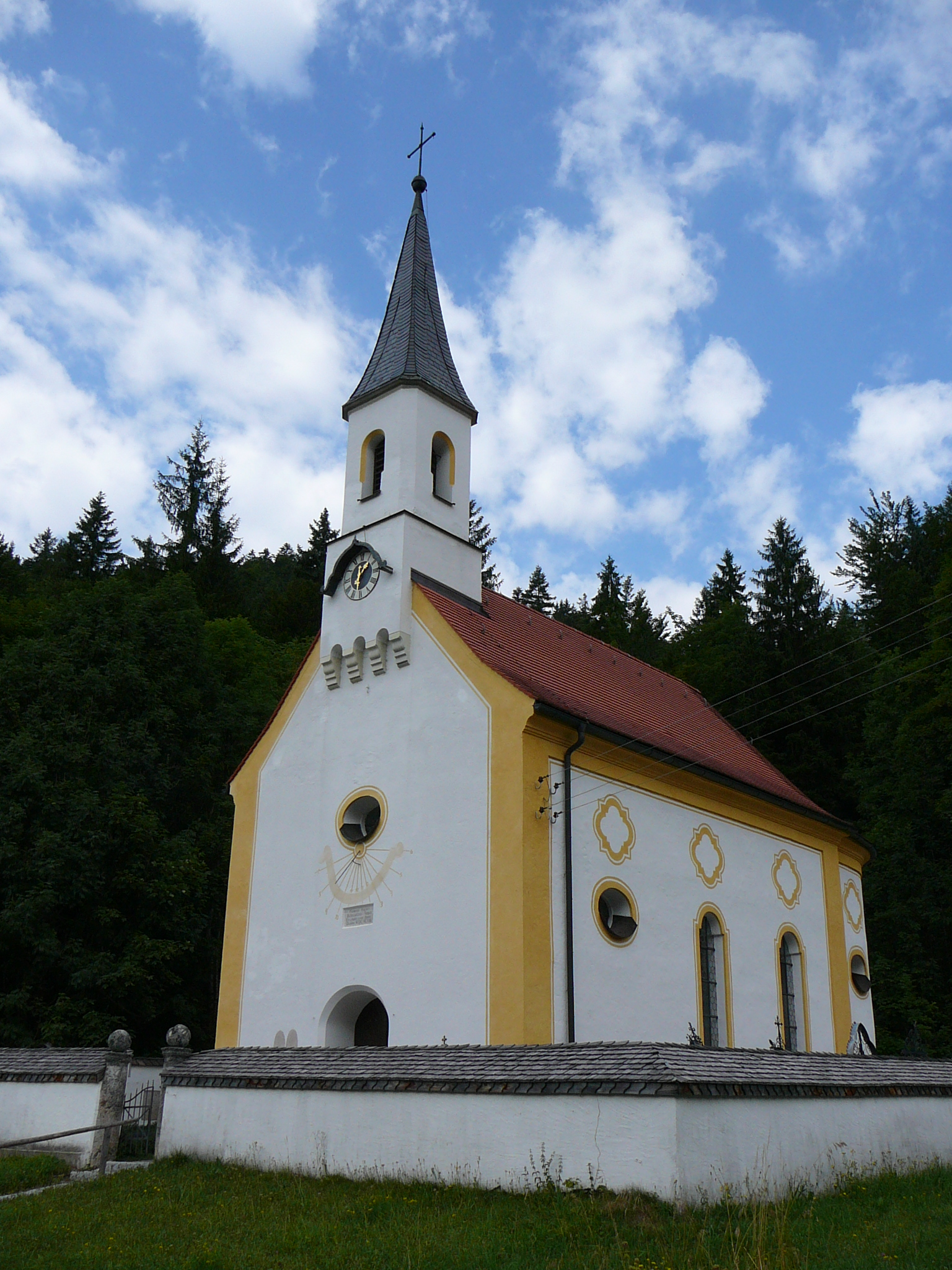 Die Kirche Mariae Heimsuchung in Glashütte (Kreuth)